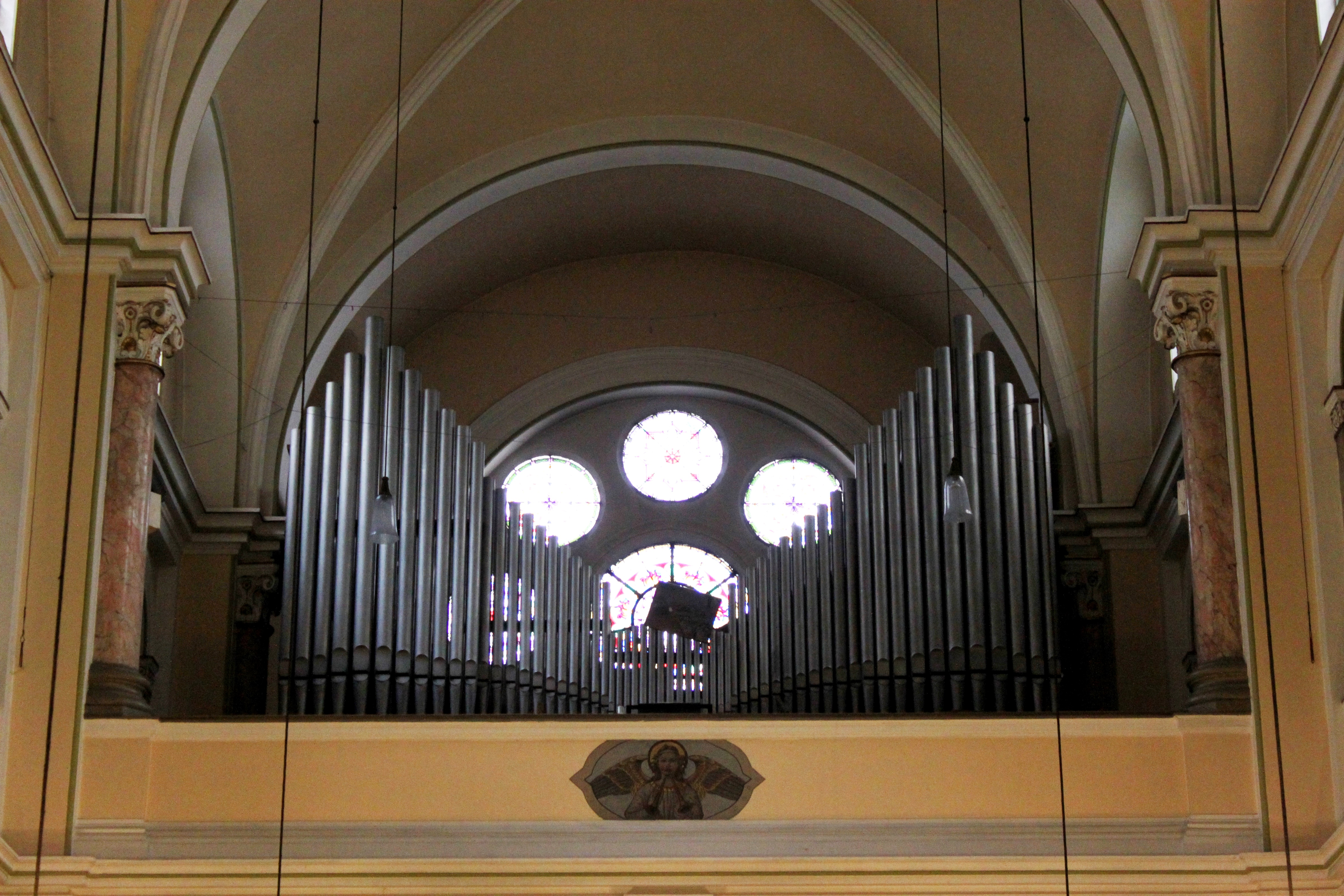 Orgel der Pfarrkirche St. Antonius von Padua, Wien XV., errichtet 1913 von Johann M. Kauffmann